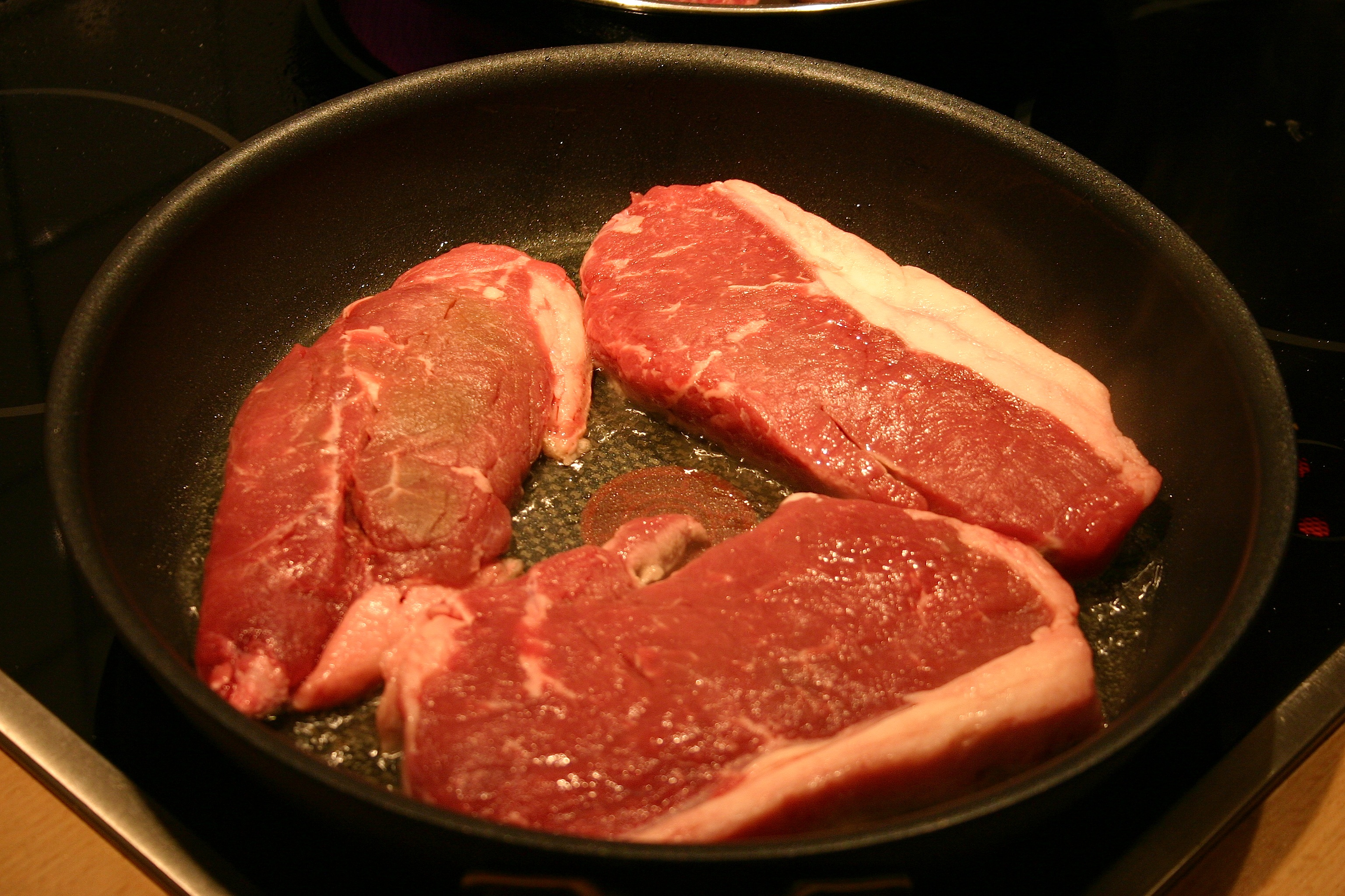 Cocinando unos filetes en una sartén.